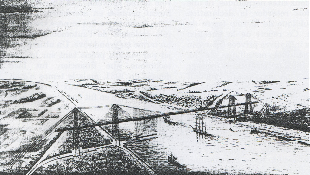 Projet Ligne du Sud-Ouest